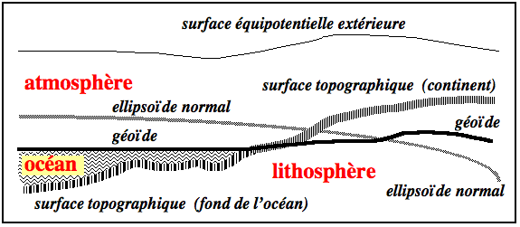 Différentes surfaces de repérage sur la Terre.